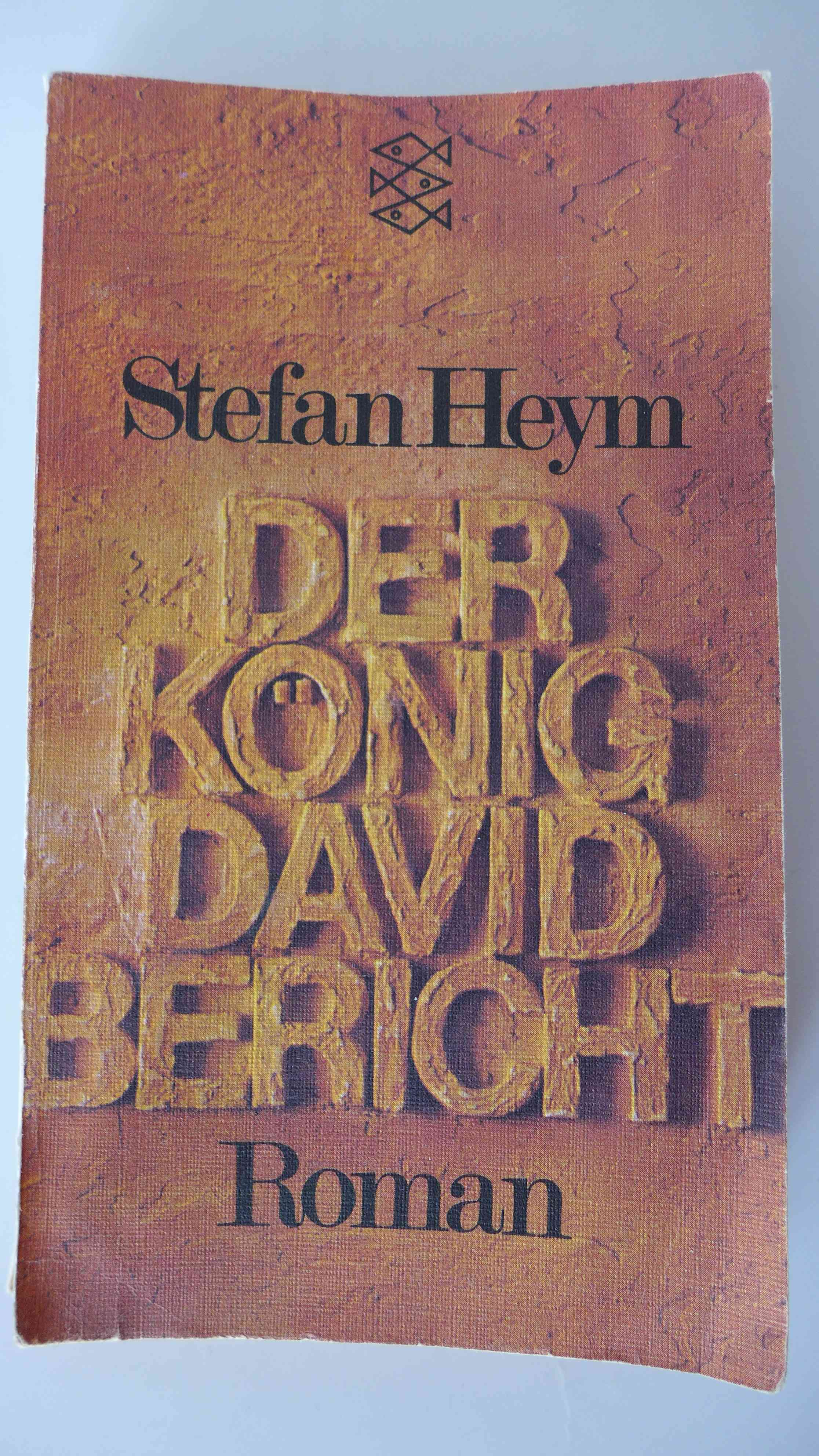 Buchtitel